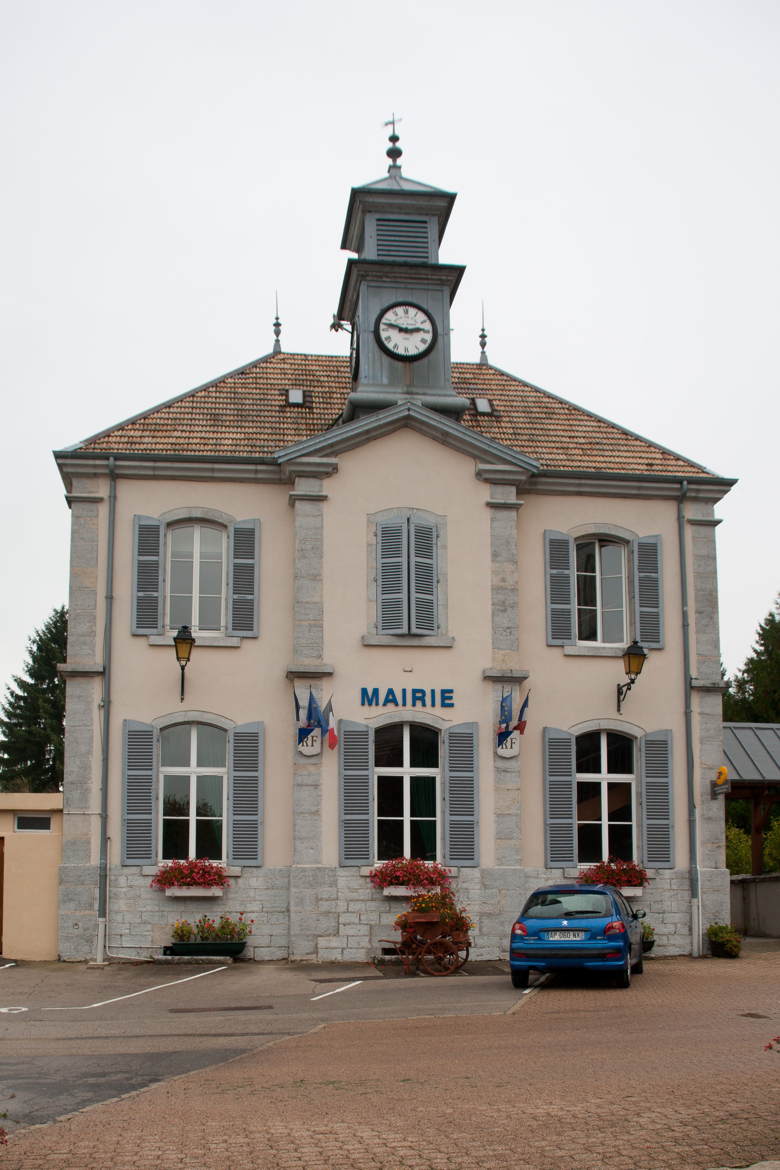 Mairie de Sirod